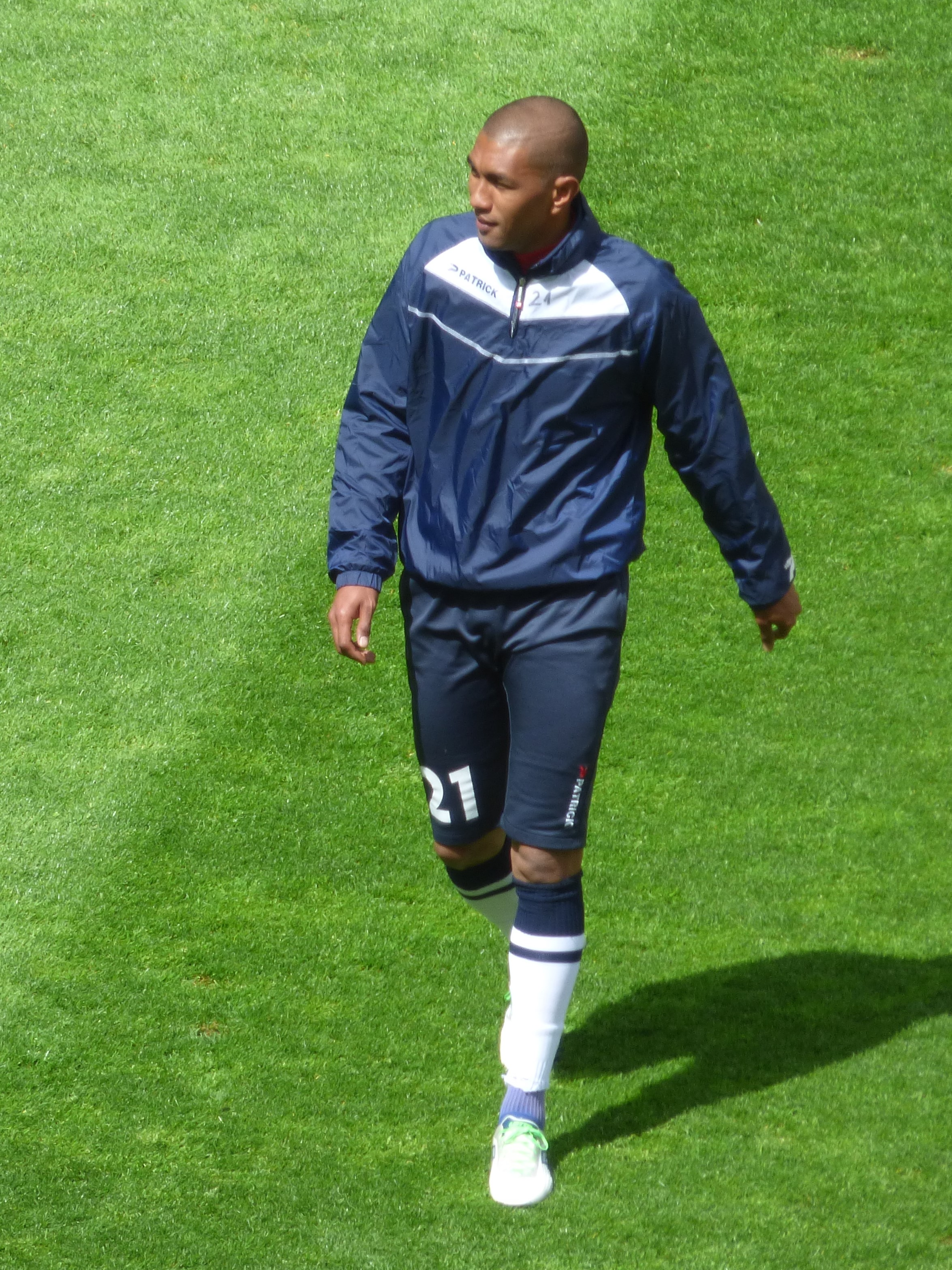 Faneva Andriatsima avant le match RC Lens / Clermont Foot 63, comptant pour la 36ème journée du championnat de France de football de Ligue 2 2018-2019, le 4 mai 2019, au stade Bollaert-Delelis.